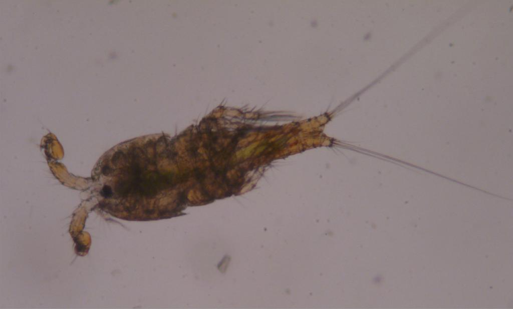 Tigriopus sp.(T. japonicus?)：雄 2015/06/06 和歌山県田辺市：Tanabe City. Wakayama Pref. Japan